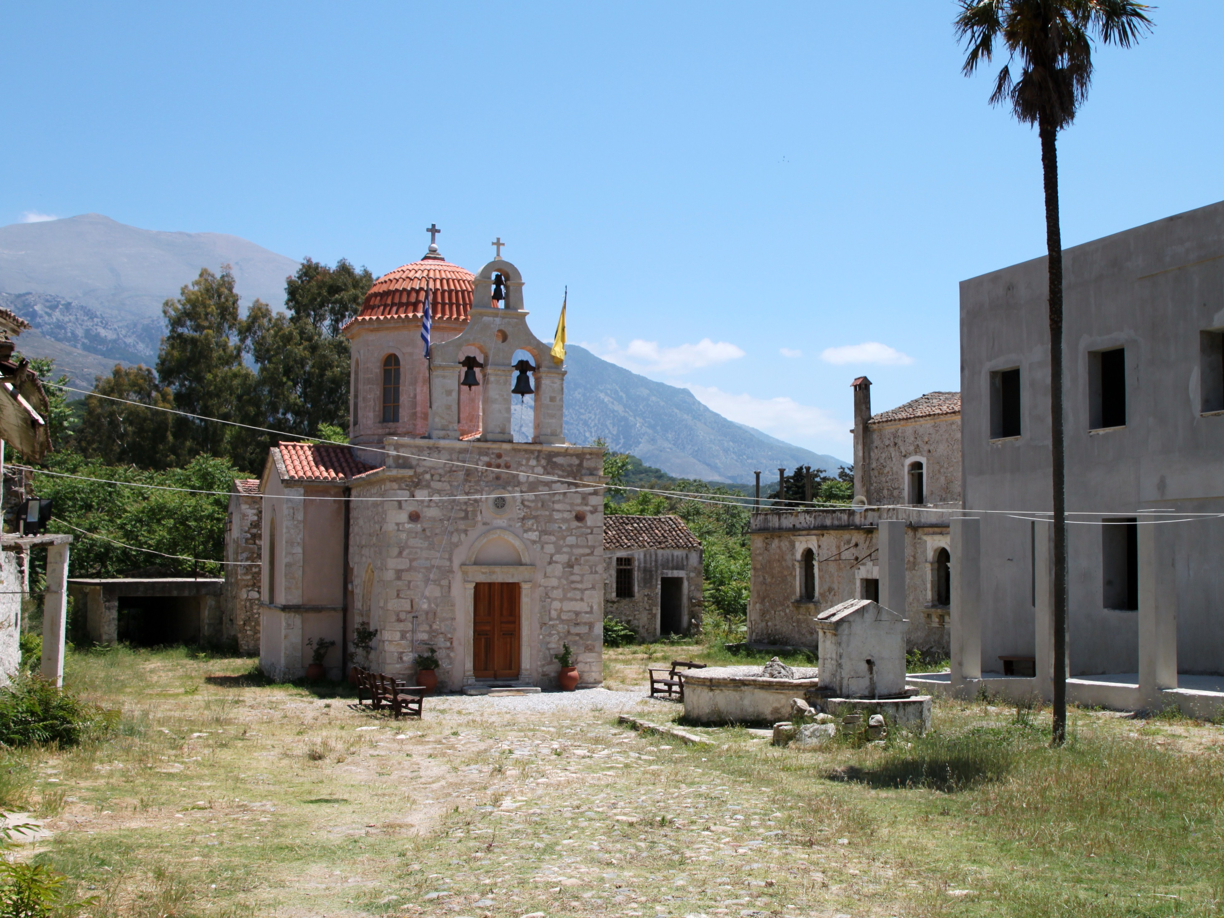 Kloster Moni Asomaton im Amari-Becken, Gemeinde Syvritos, Präfektur Rethymno, Kreta, Griechenland